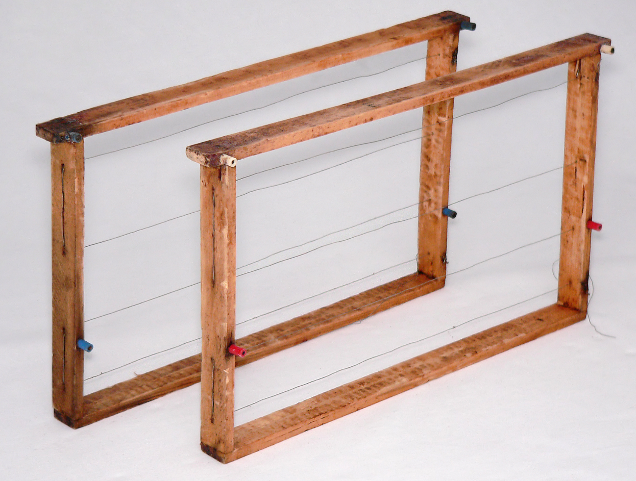 2 gedrahtete Rähmchen im Maß Deutsch Normalmaß, bereits benutzt durch Wabenbau, Waben ausgeschnitten, gewaschen und wieder gedrahtet